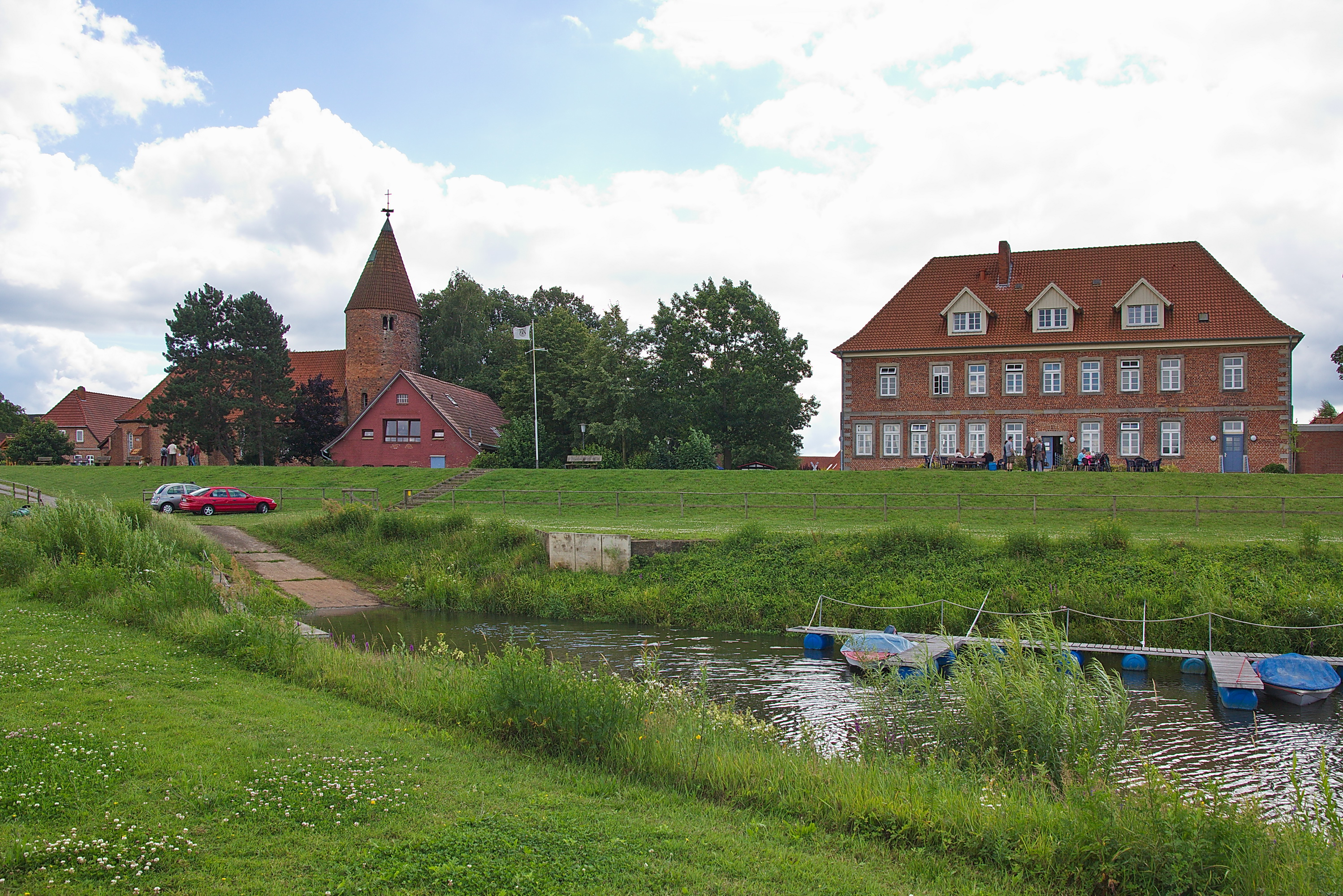 Allerhafen vor dem Amtshaus und der Kirche St.Annen in Westen (Dörverden), Niedersachsen, Deutschland.